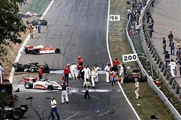 Incidente al GP Monza 1978